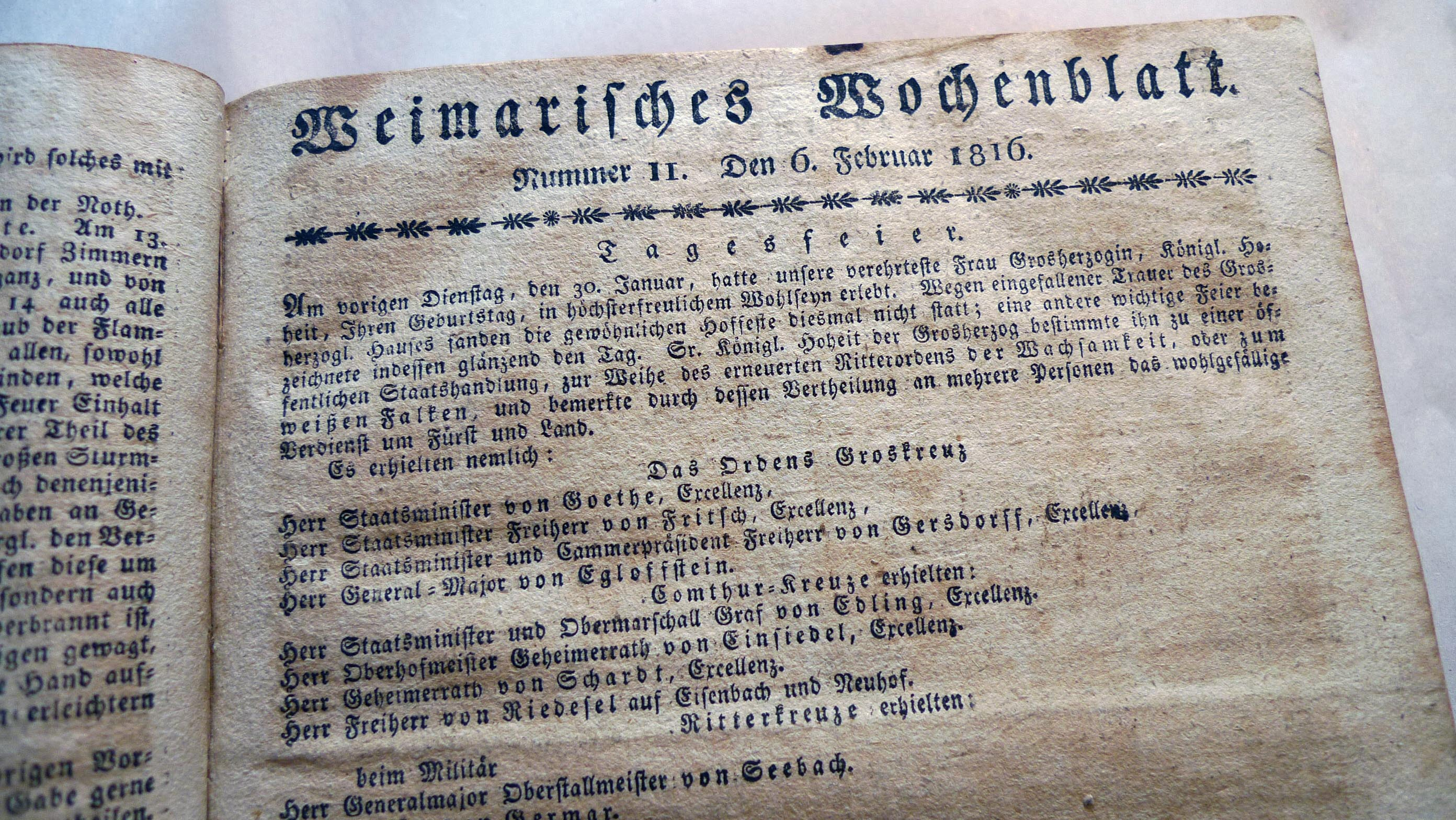 Titelseite des Weimarischen Wochenblatts vom 6. Februar 1816: "Staatsminister von Goethe" erhält neben anderen das Großkreuz des Weimarischen Hausordens. (Privatbesitz)